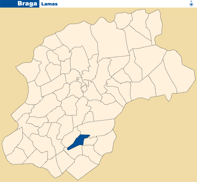 Localização de Lamas no concelho de Braga.